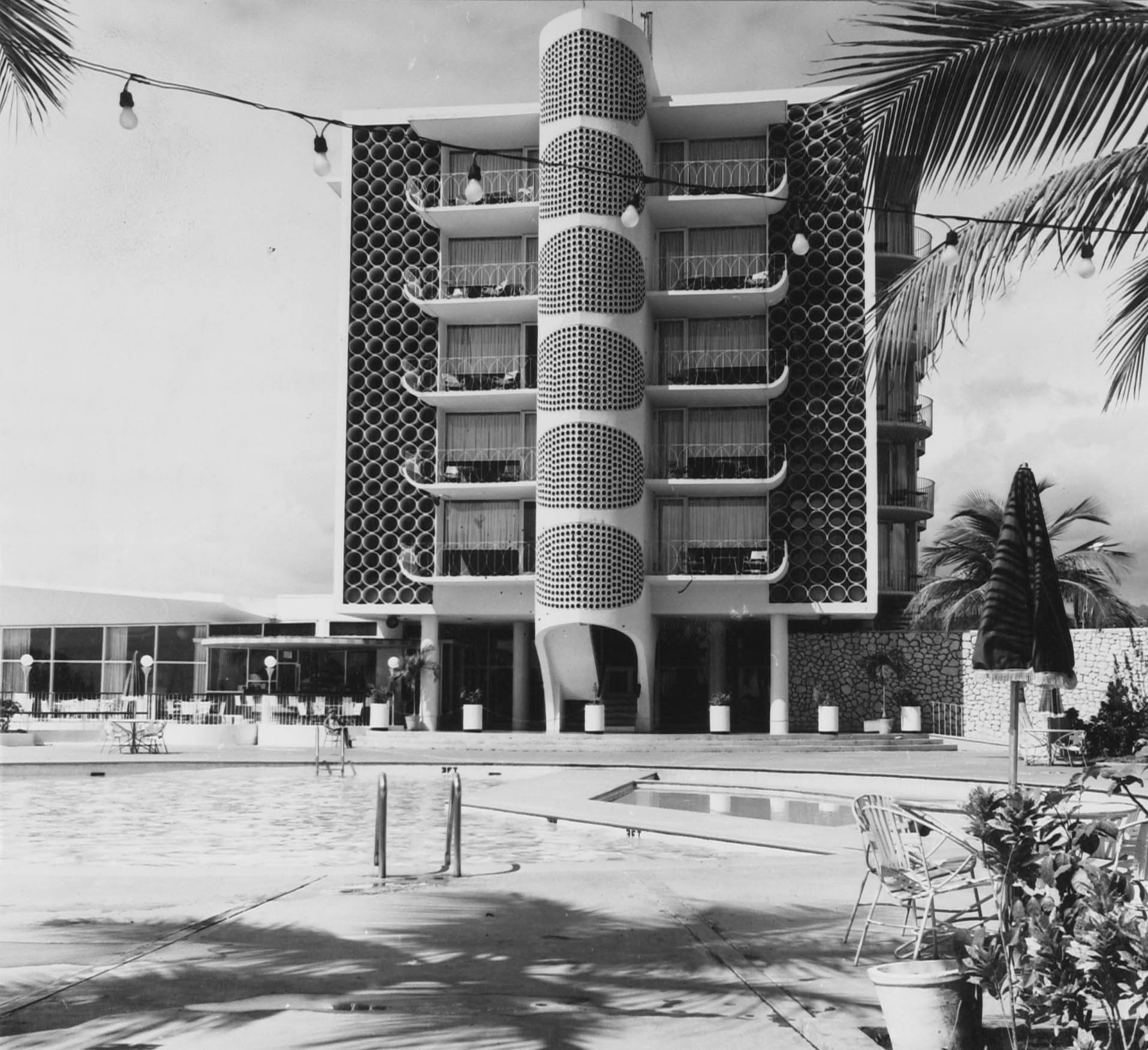 Negatief.